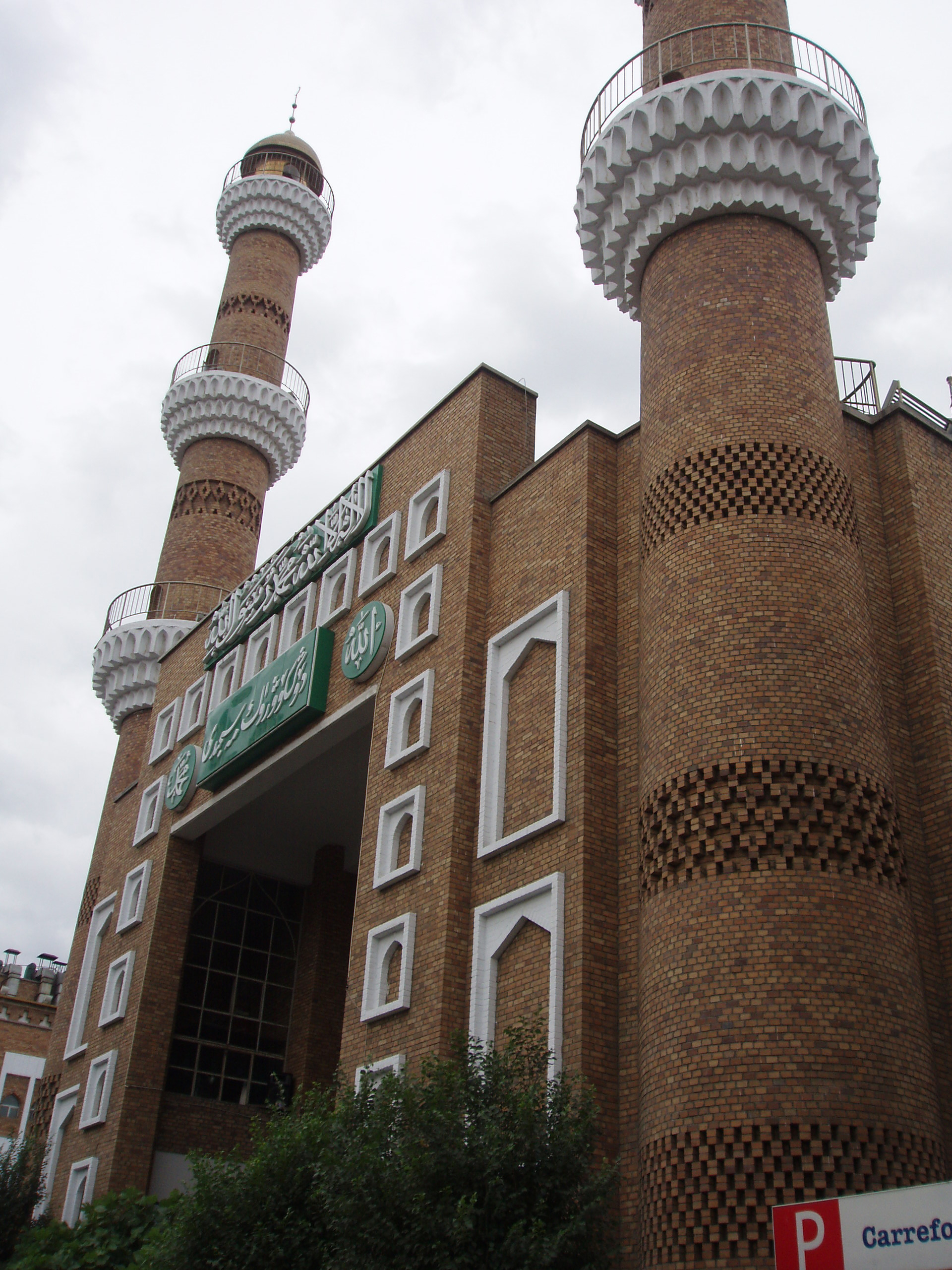 Mosque and minarets — Ulumqi, Xinjiang, China.